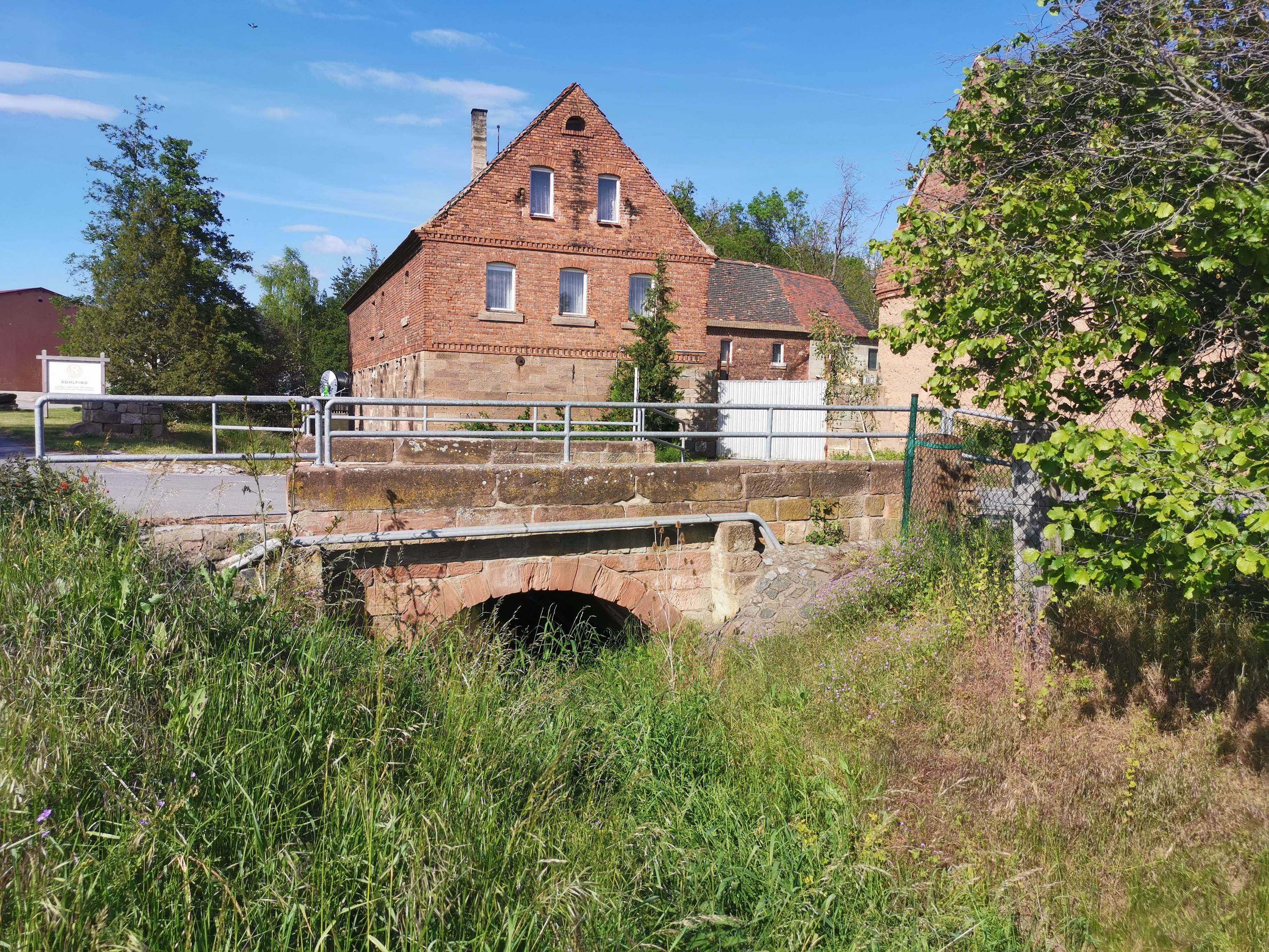 Brücke Straße des Fortschritts im Liederstädt bei der ehemaligen Mühle